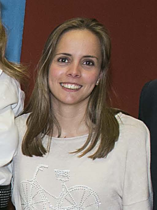 Esta tarde he inaugurado la nueva sede del PP de Villaviciosa de Odón, junto a su presidente local, José Jover. Una sede que representa lo que es el Partido Popular de Madrid: sencilla, acogedora y a pié de calle.